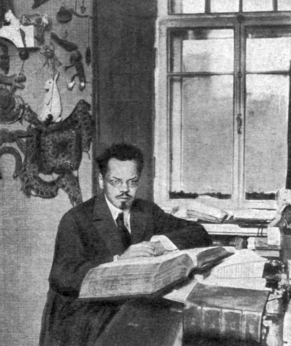 Ремизов Алексей Михайлович за рабочим столом